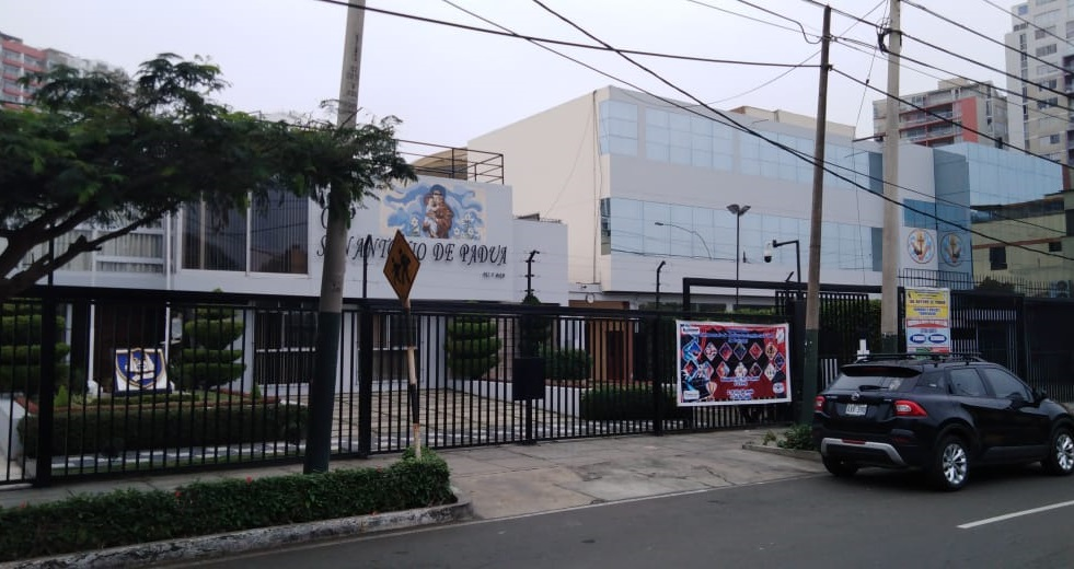 Colegio San Antonio de Padua (Lima) 2019